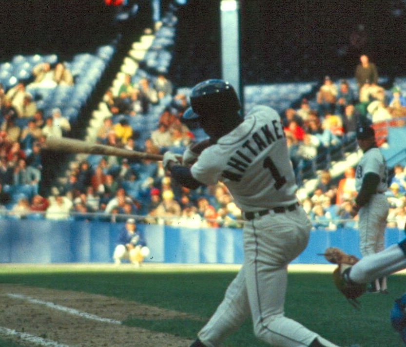 (77) Tiger Stadium (Lou Whitaker) 8.81